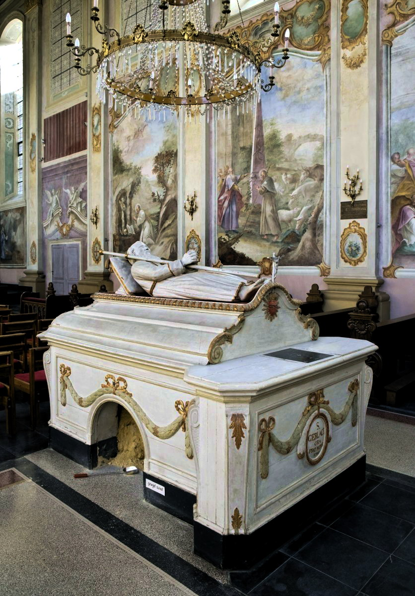 Sint Gerlachuskerk: Interieur, graftombe van Gerlachus met daar onder het heilig zand (opmerking: Gefotografeerd voor publikatie voor het boek Heiligdom / Sanctuary Sint Gerlach.)